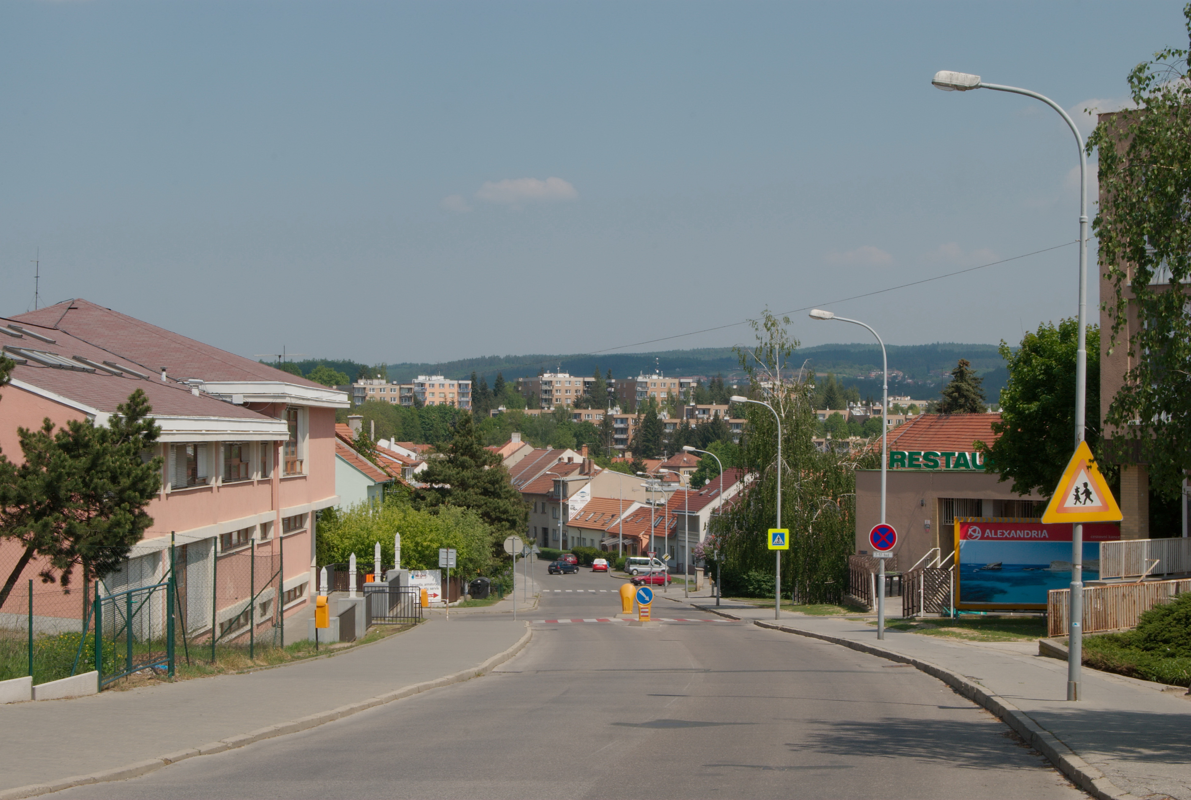 Řečkovice - pohled na Řečkovice přes ulici Vážného